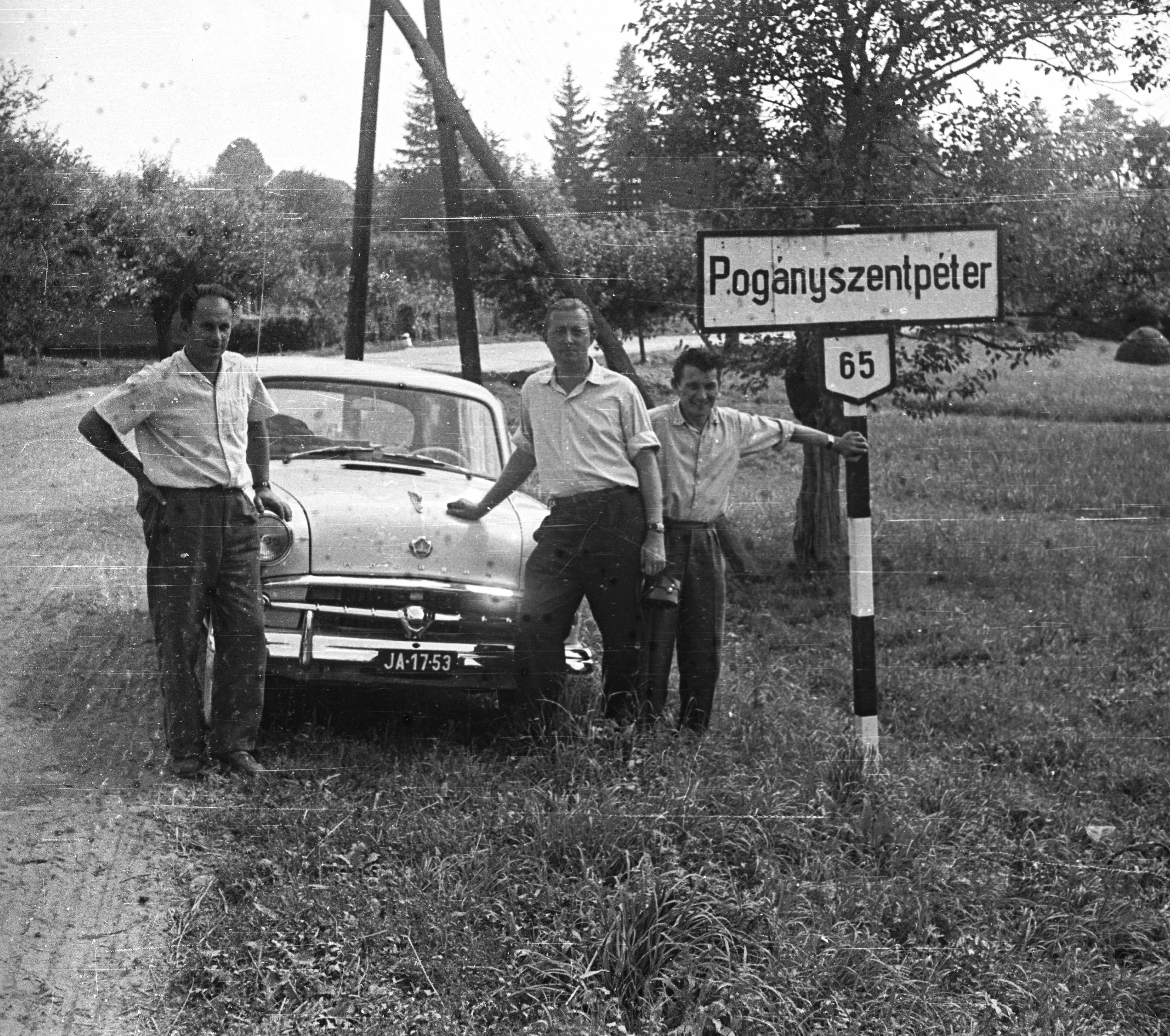 a község északi határa. Location: Hungary, Pogányszentpéter Tags: taxicab Title: a község északi határa.